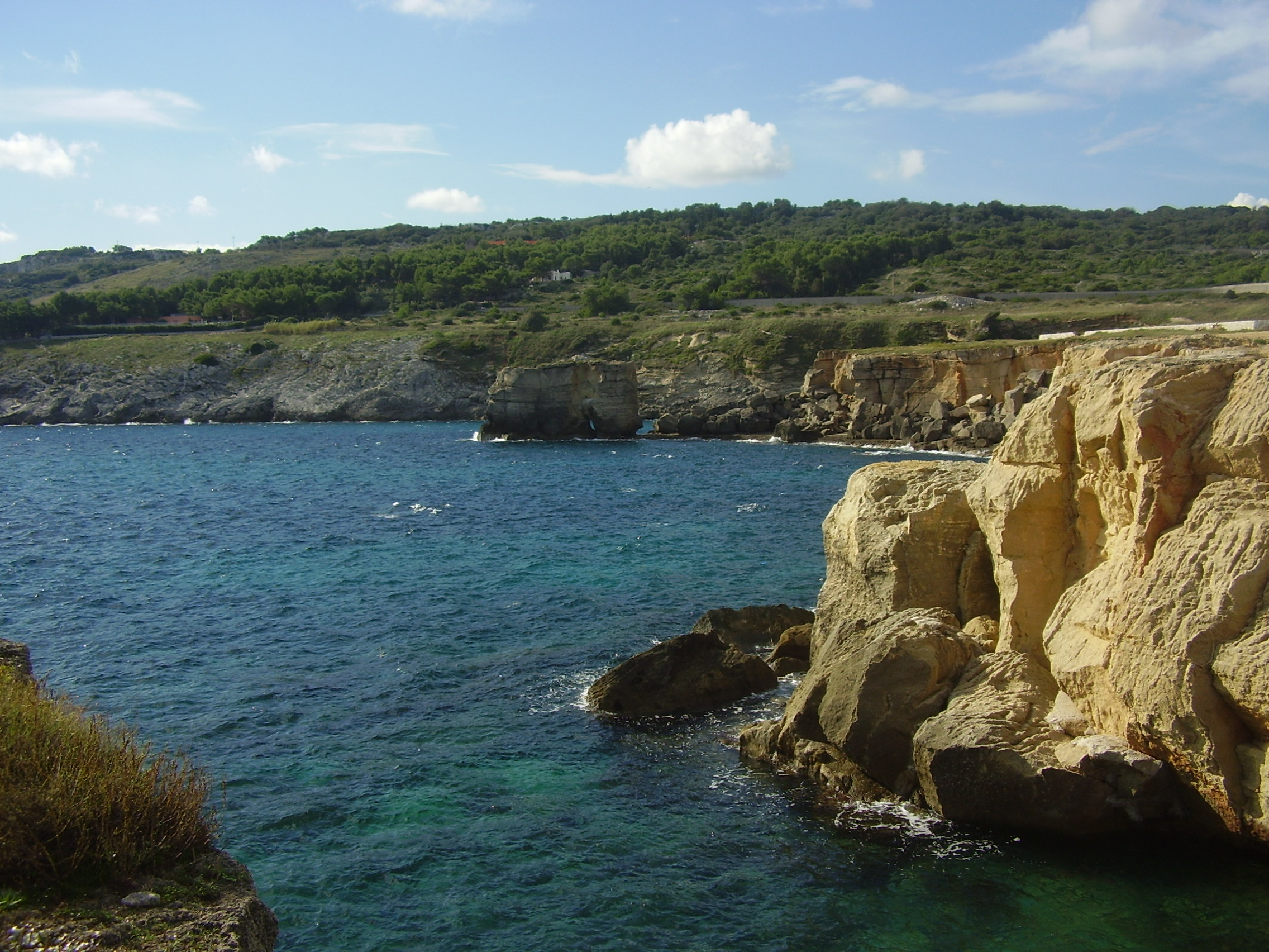 Costa di Porto Miggiano, Santa Cesarea Terme, Lecce